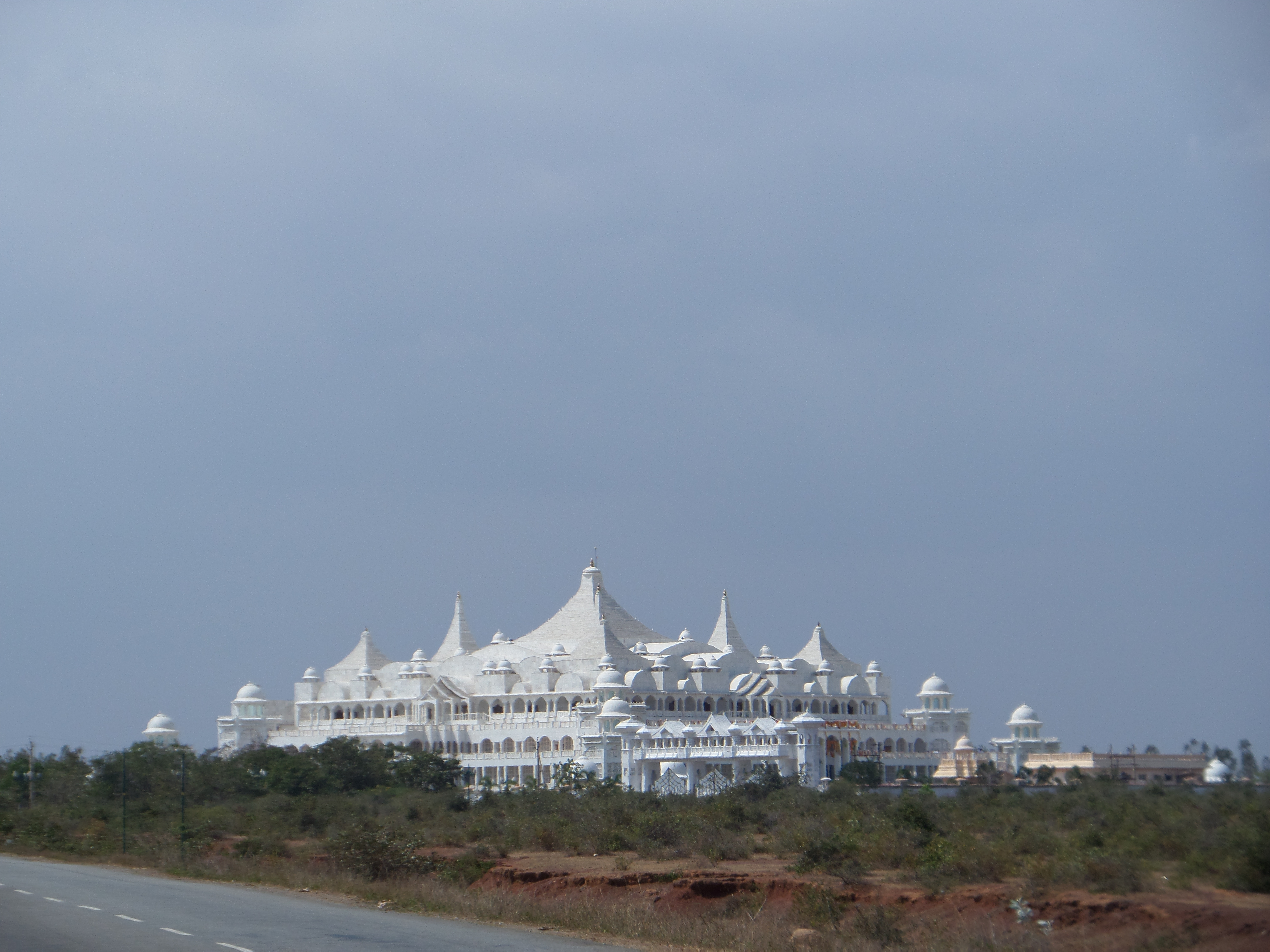 temple varadiahpalem AP